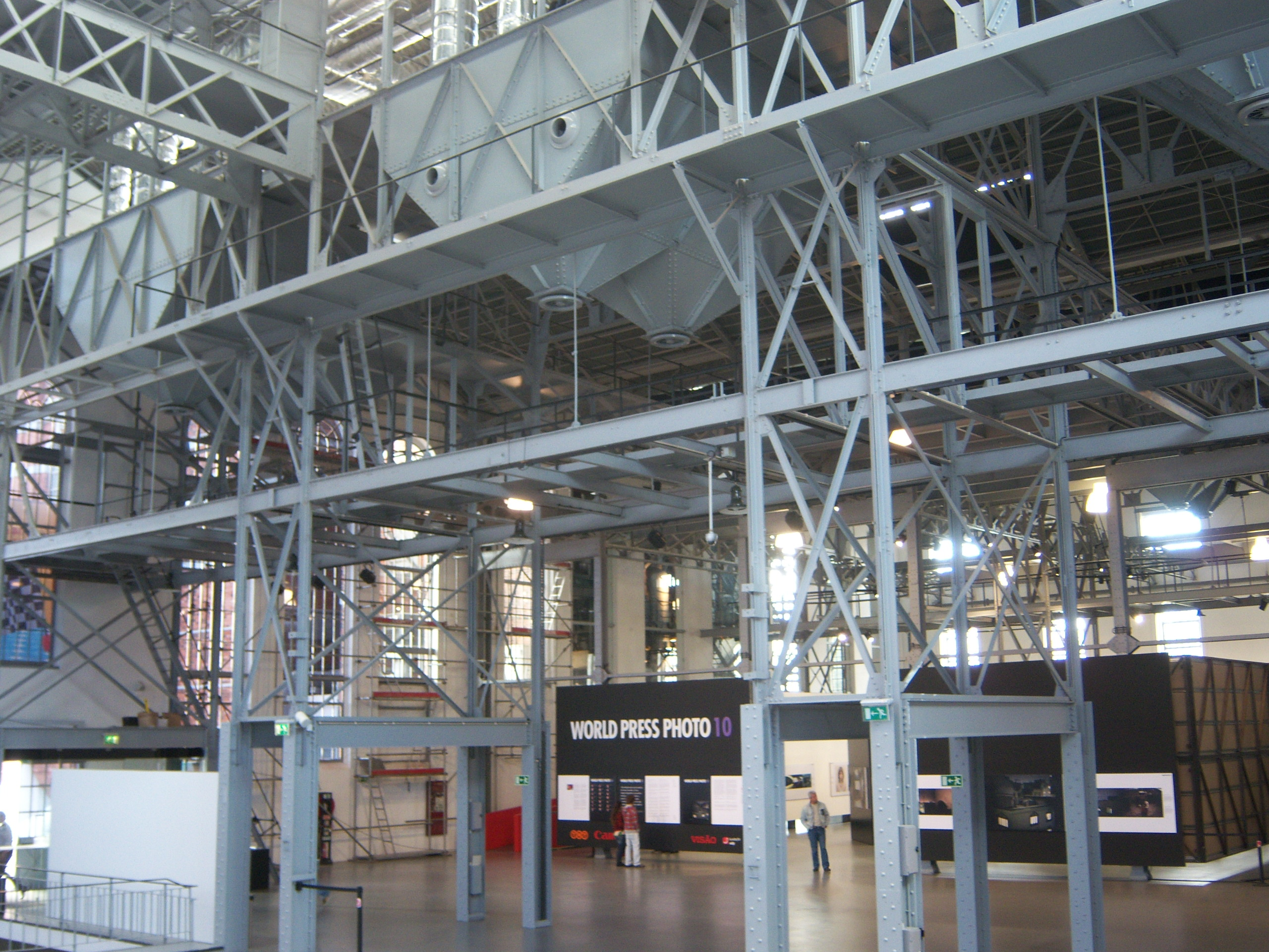 Vista da Sala das Caldeiras de Alta Pressão, actualmente sala de exposições temporárias. Museu da Electricidade.